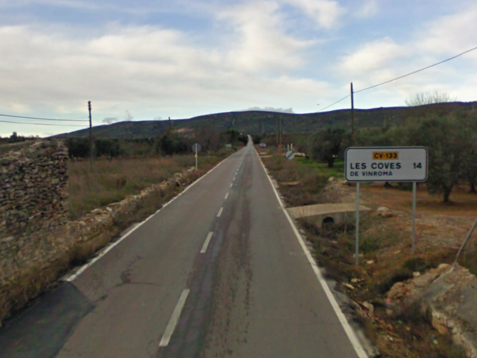 Imagen de la carretera CV-133 en Alcalá de Chivert, Castellón, España